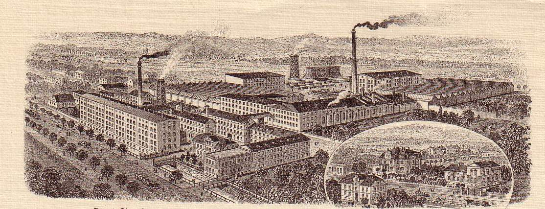 Factory G. F. Flechtner, Langenbielau